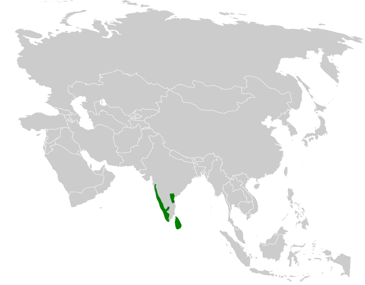 Acritillas indica distribution map, based on